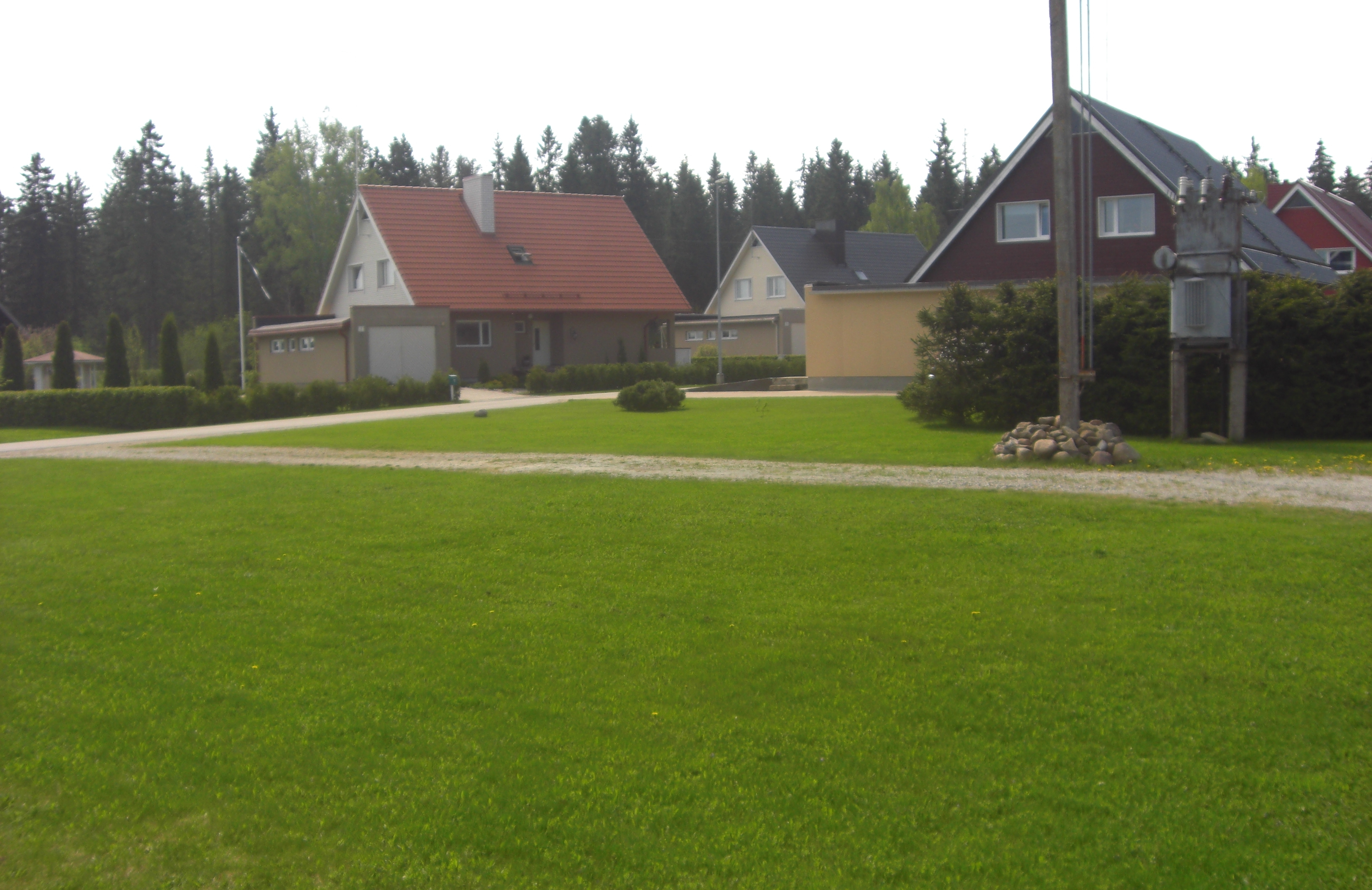 Niidu